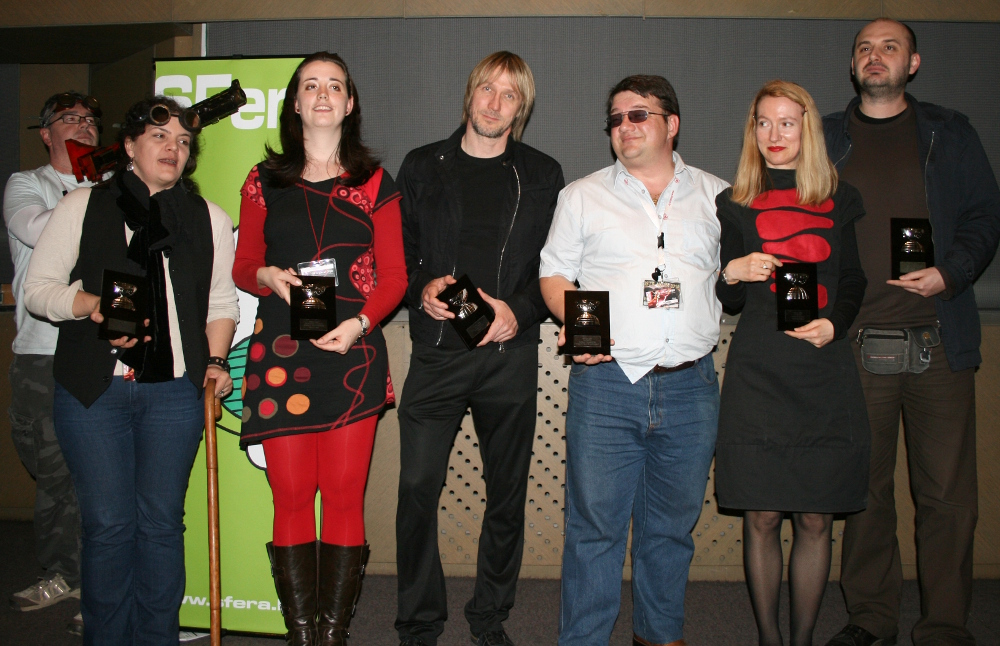 Dobitnici nagrade SFERA 2010. godine